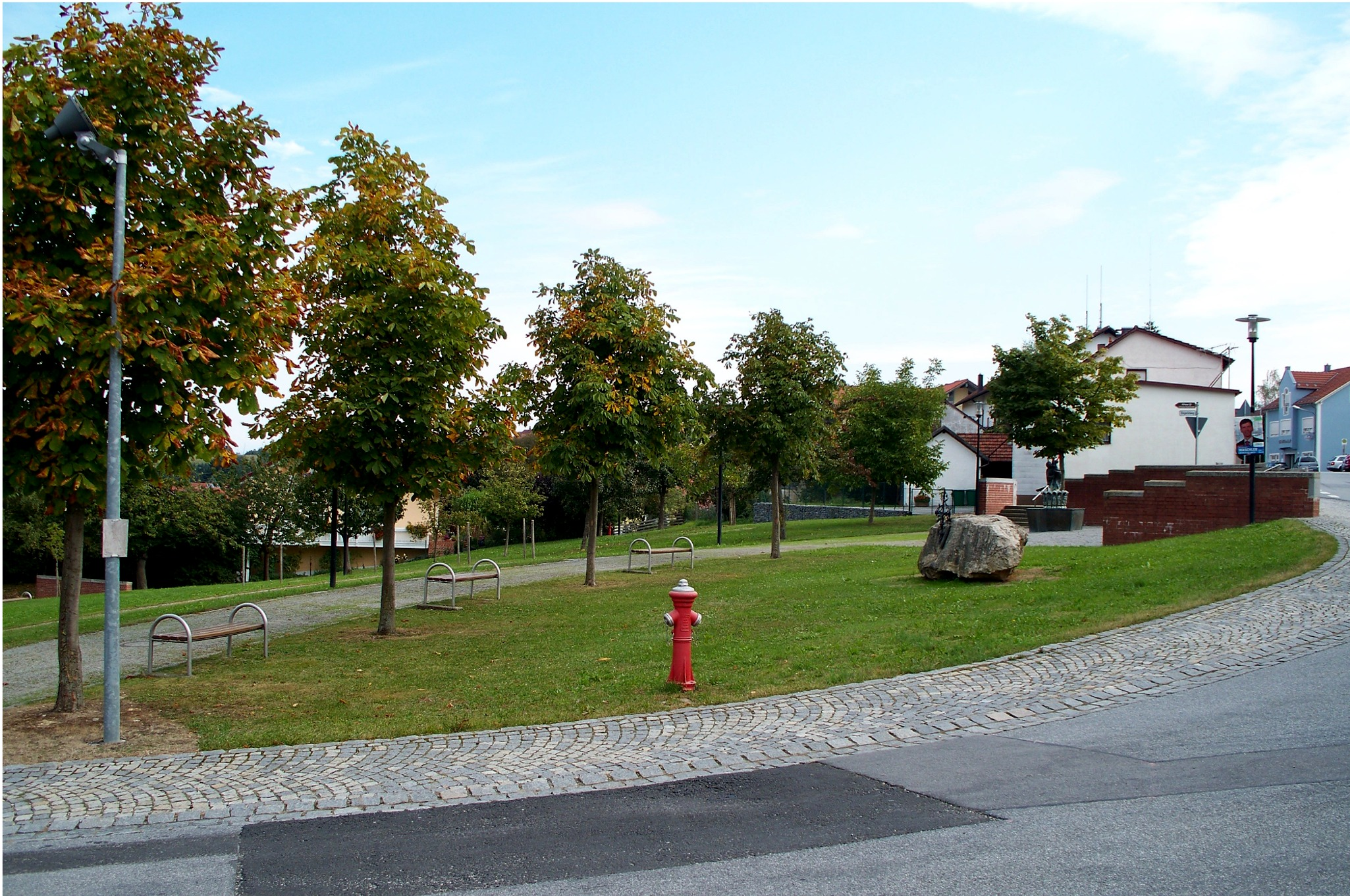 Der Dorfplatz von Alkofen - ein Stadtteil von Vilshofen a.d. Donau -, der 1995 neu gestaltet wurde.